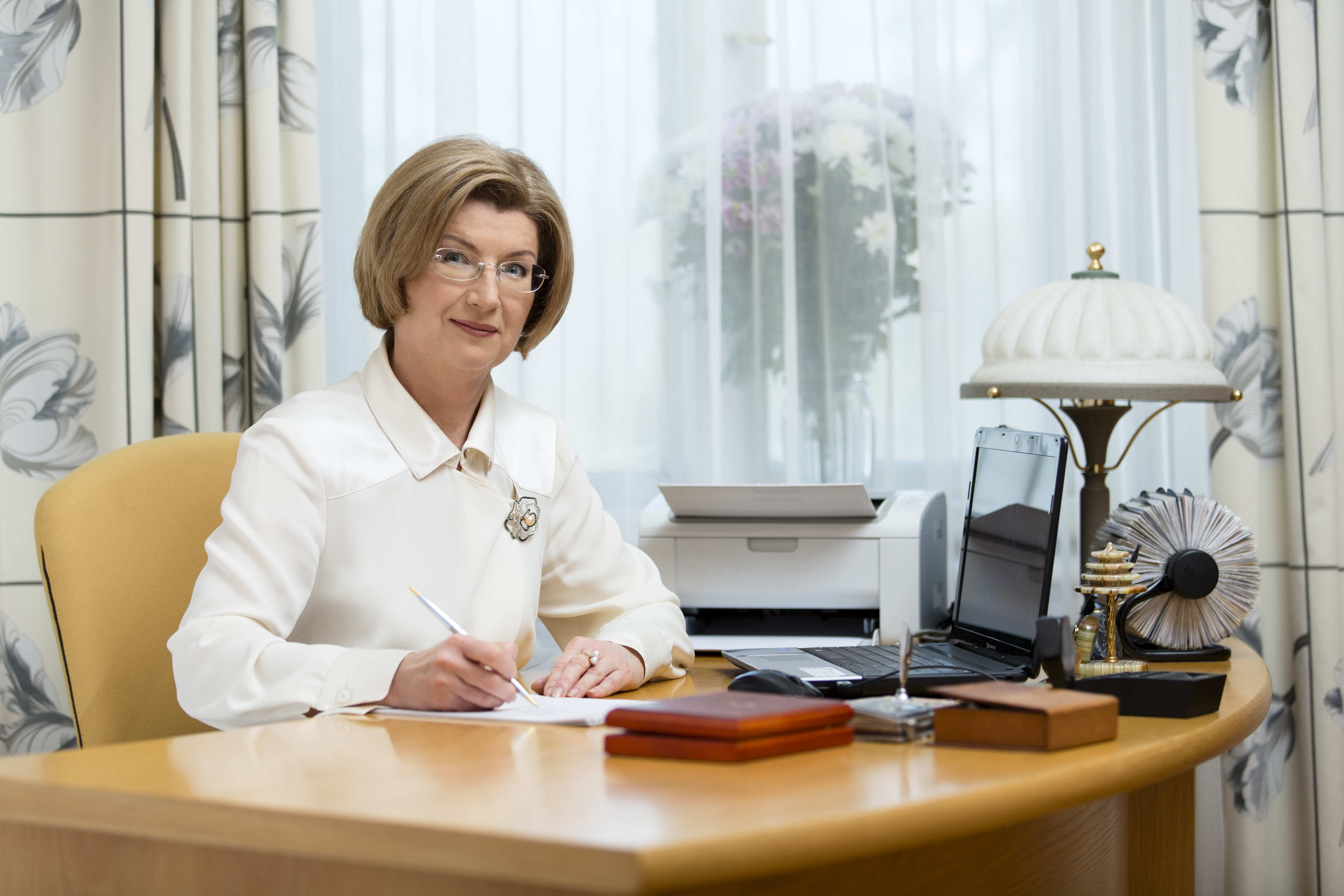 Inguna Sudraba, partijas "No sirds Latvijai" priekšsēdētāja